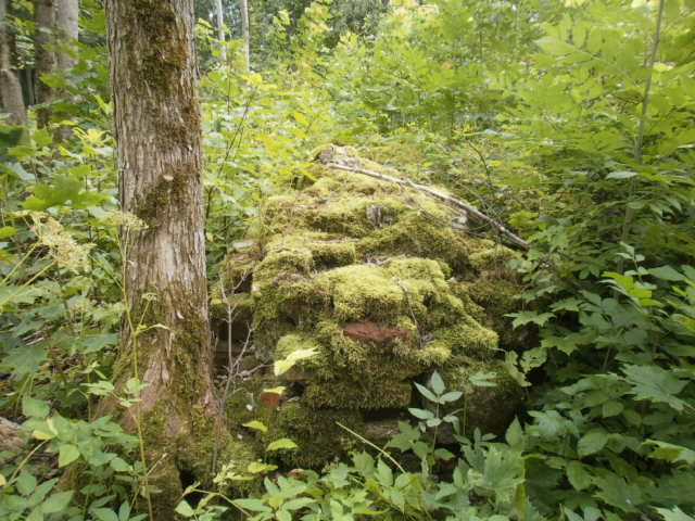 Linnuse keskel asunud hoone vundament. Näha on tellis- ja põllukivi segaladu.